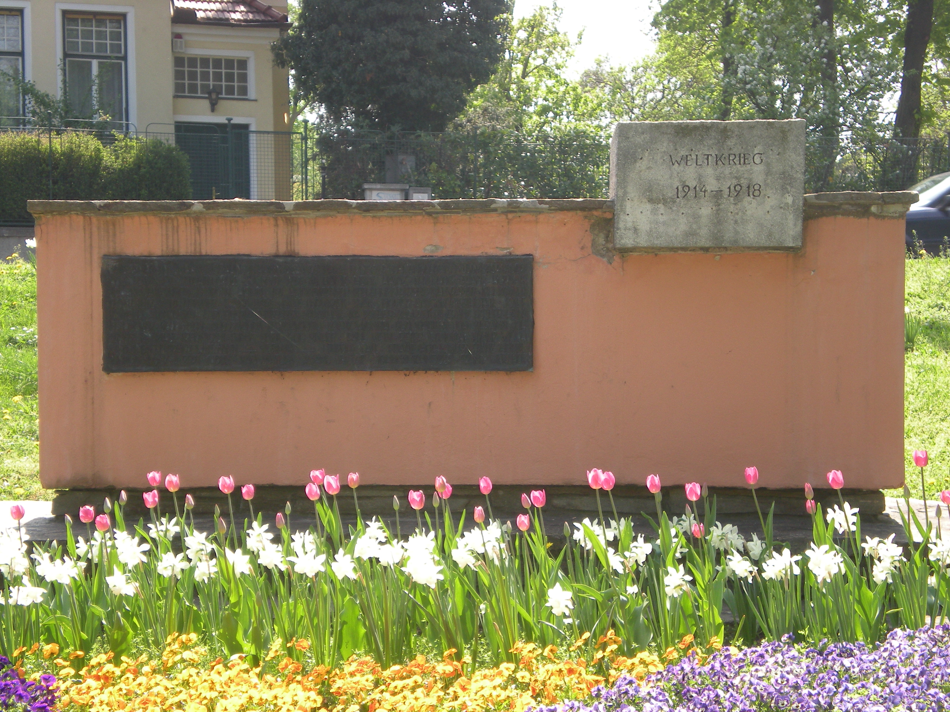 Kriegerdenkmal 1914 - 1918, Asperner Heldenplatz, Wien 22